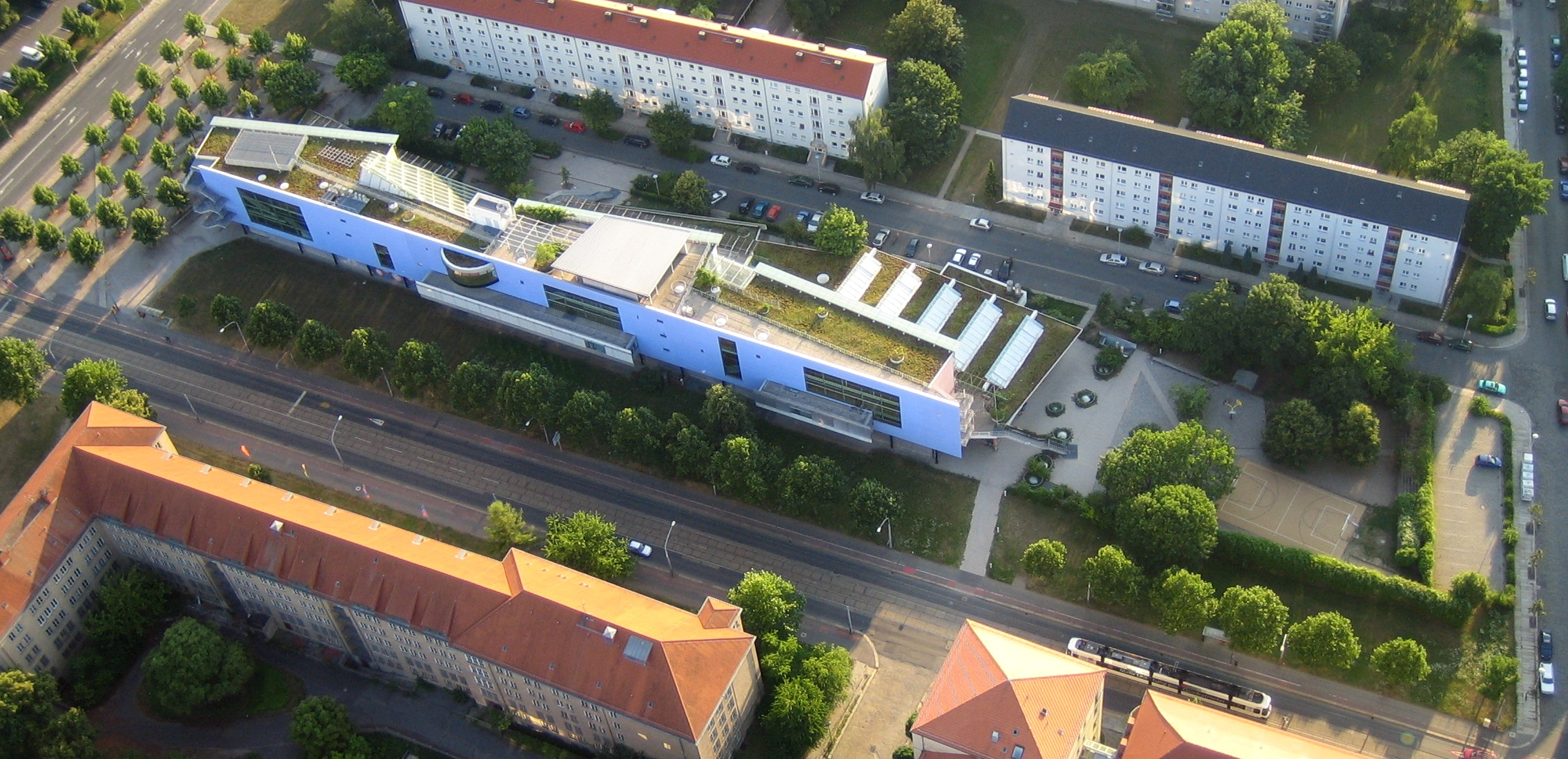 Luftaufnahme des St. Benno-Gymnasiums Dresden